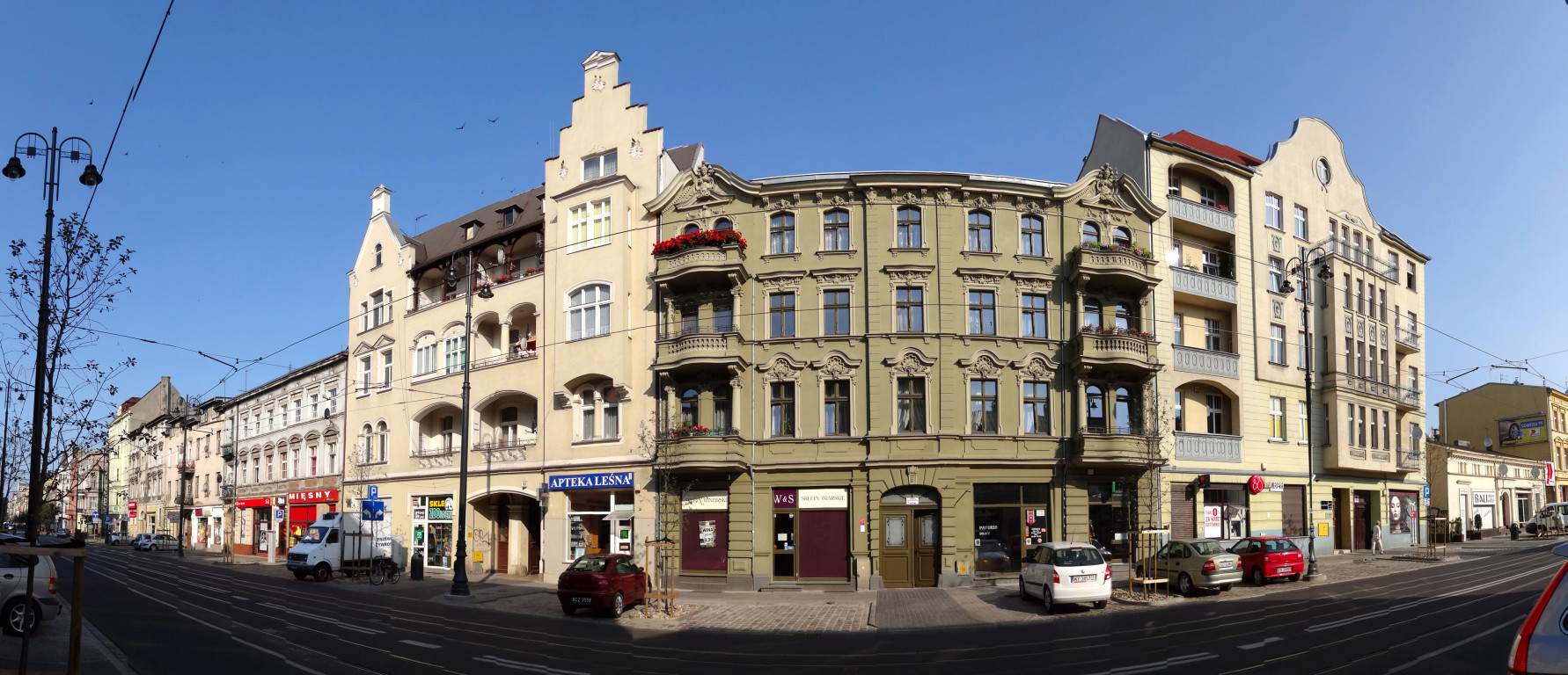 Ulica Gdańska w Bydgoszczy